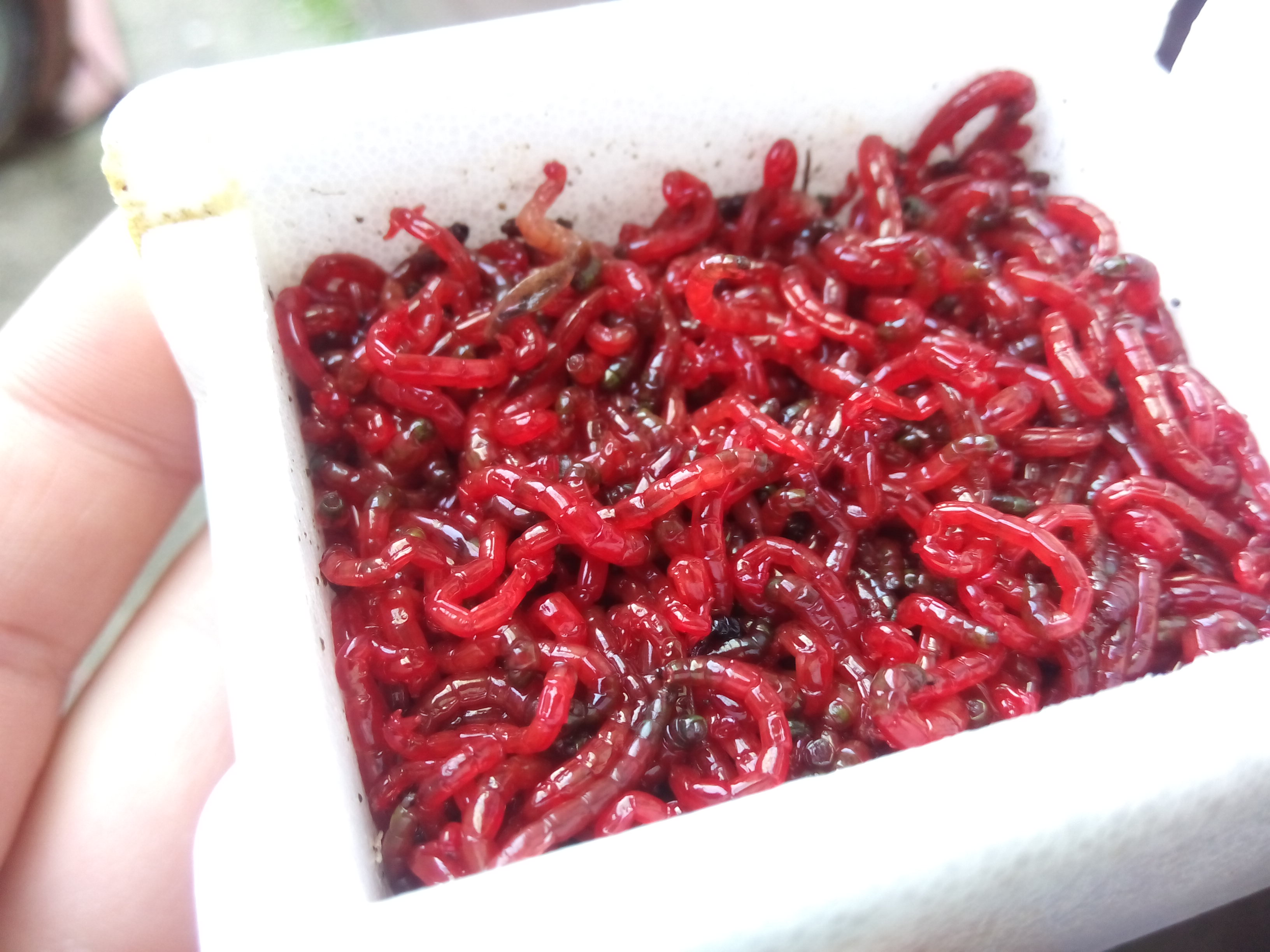 Мотыль в пенопластовой коробочке